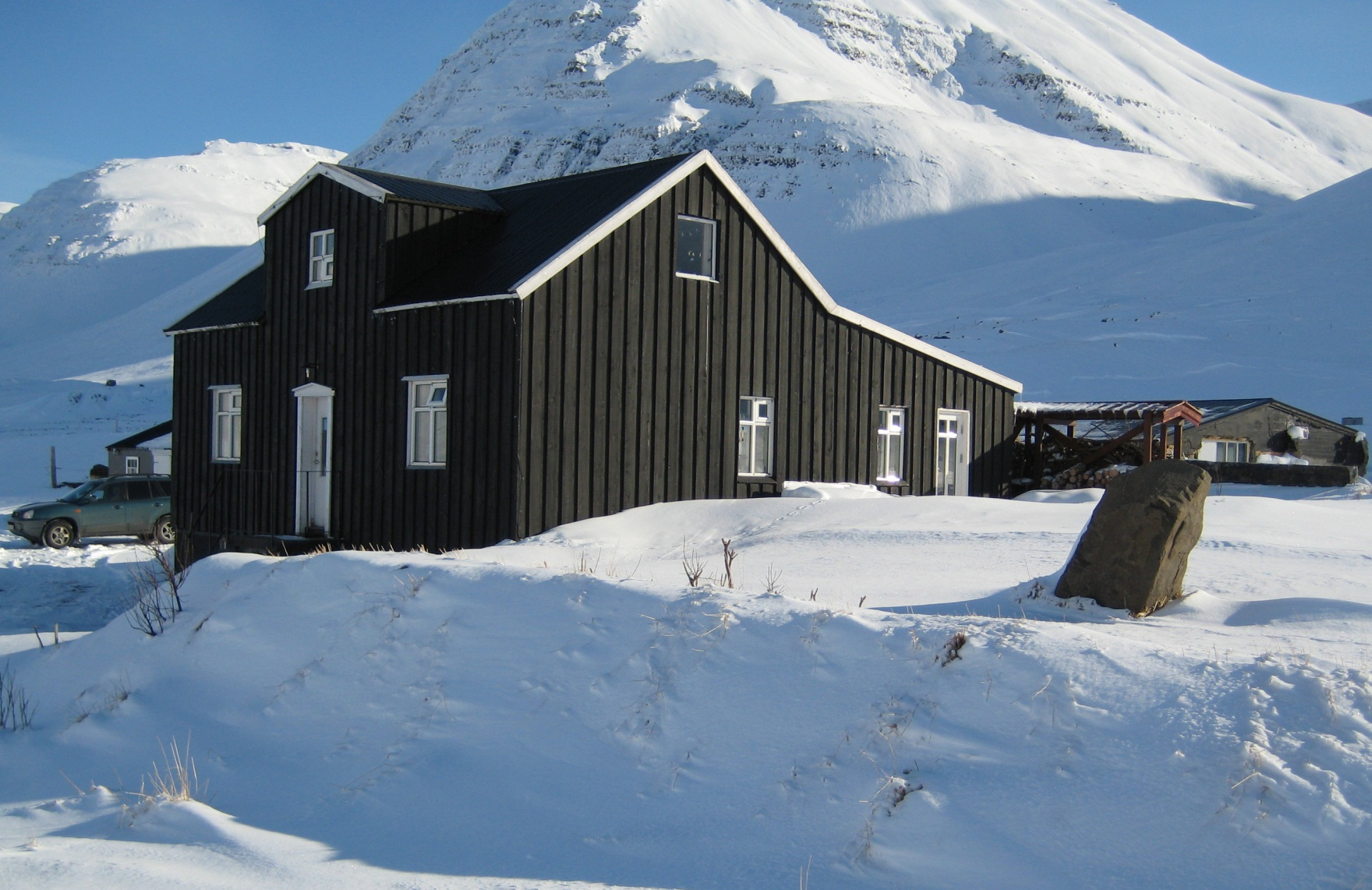 Skeið Í Svarfaðardal (Dalvíkurbyggð) - Skeið, a farm in Svarfaðardalur, North Iceland